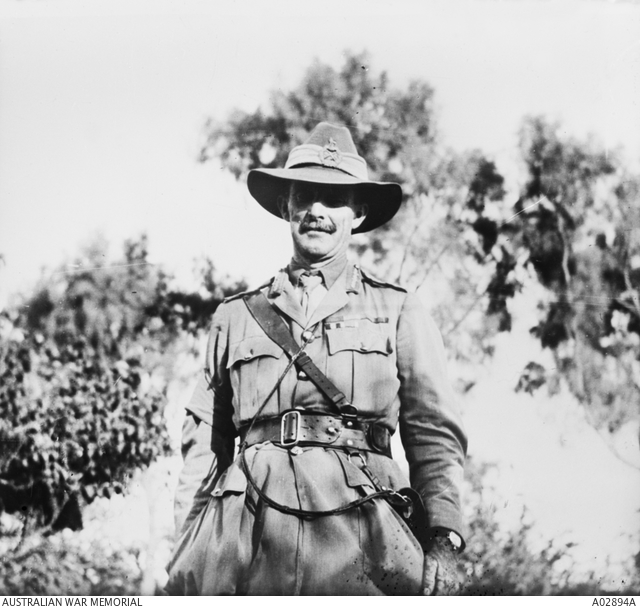 מייג'ור גנרל אדוארד צ'ייטור